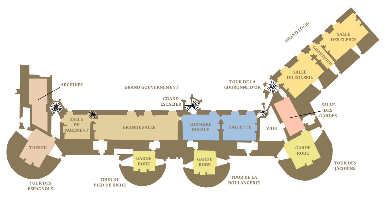 Plan du premier étage du château des ducs de Bretagne, Nantes, au XVème siècle. D'après les recherches d'Alain Salamagne.